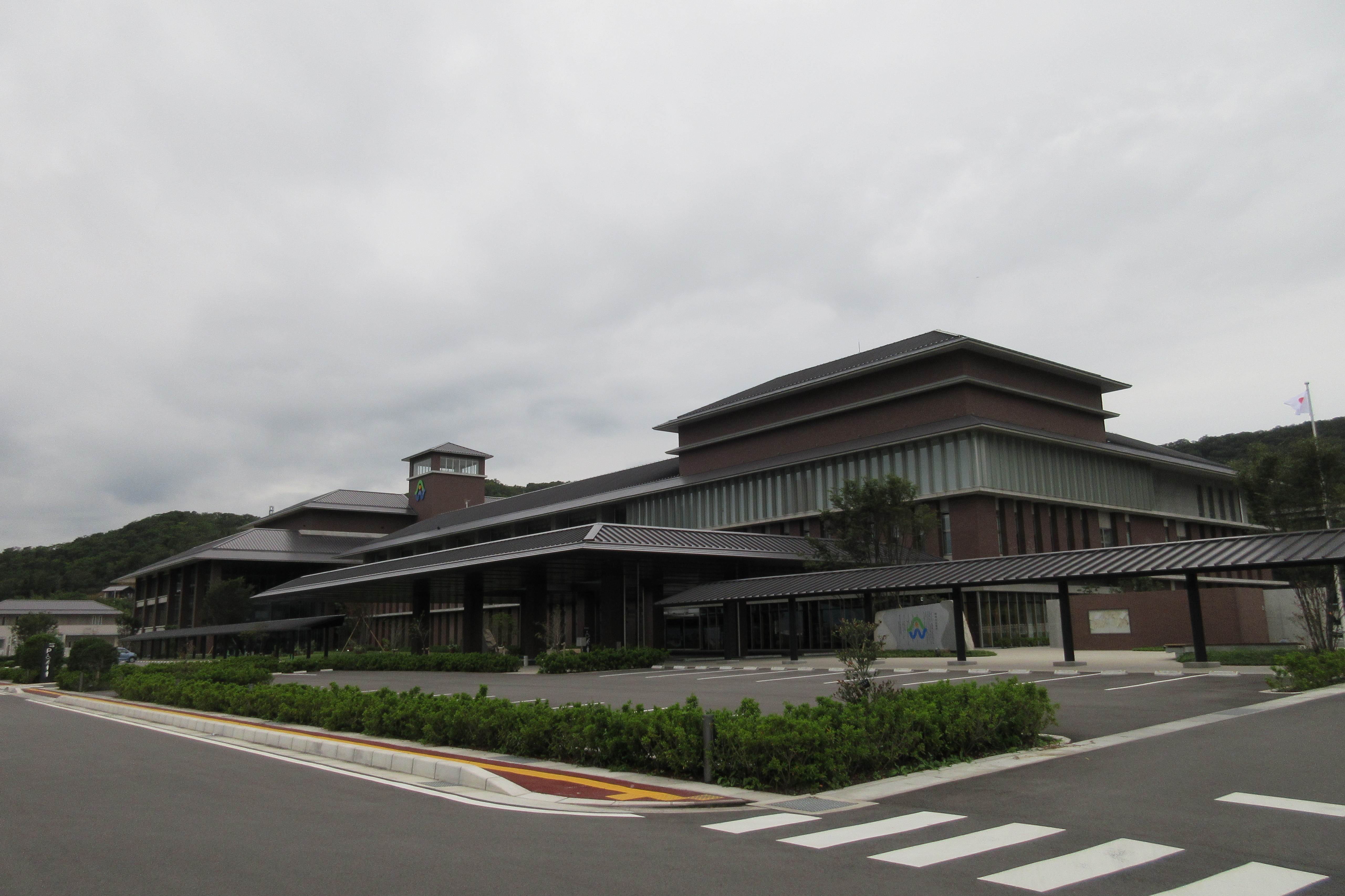 阿波市役所本庁舎